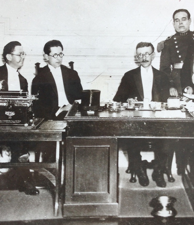 Fotografía del Gobernador de Tucumán, Octaviano Vera, junto a sus ministros en el despacho de la Casa de Gobierno.